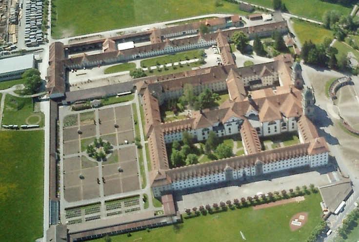 Kloster Einsiedeln (Flugaufnahme aus Cessna)